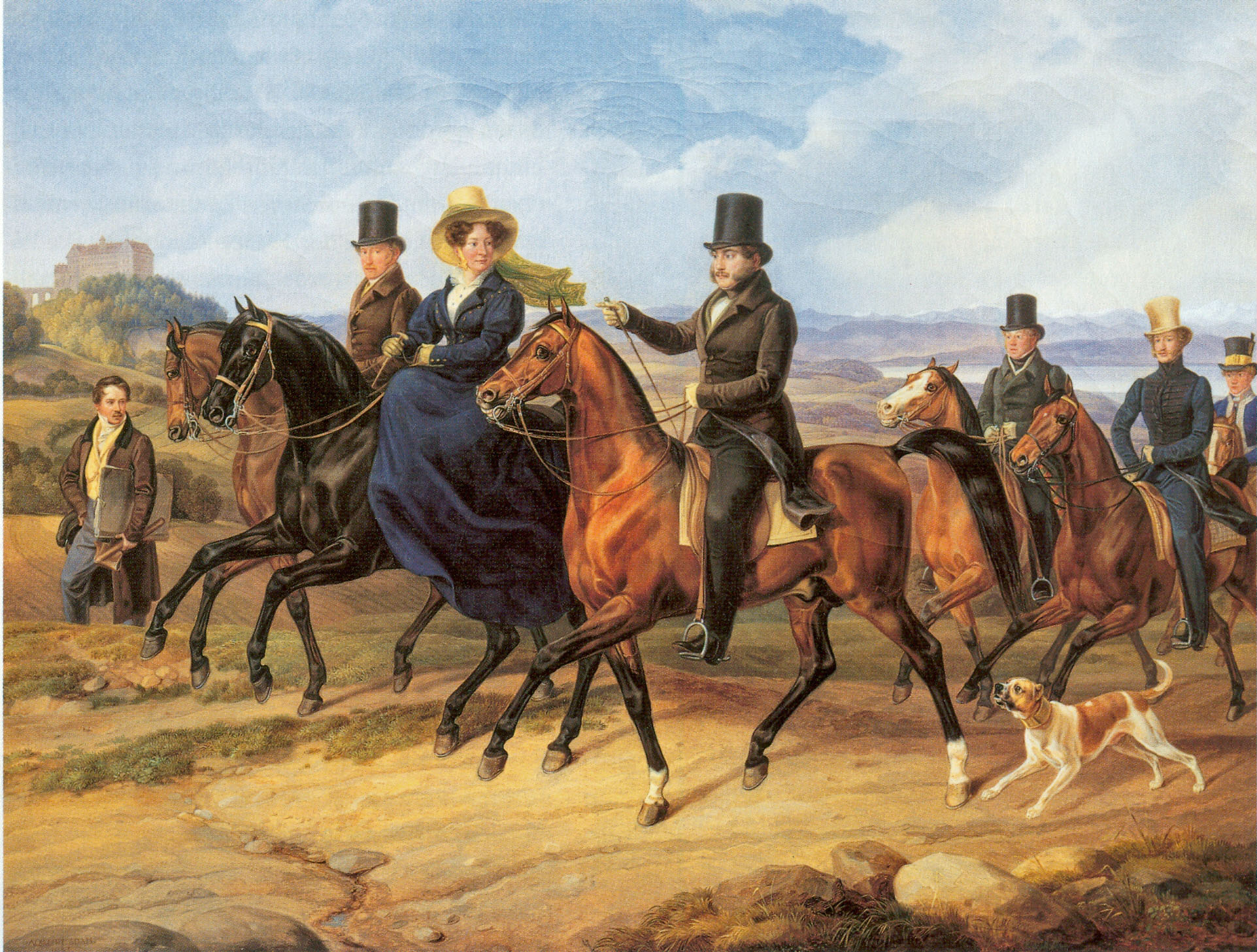 Kavalkade vor Schloss Heiligenberg Fürst Karl Egon II. zu Fürstenberg und Amalie, geb. Prinzessin von Baden. im Gefolge: Oberstallmeister Carl von Schreckenstein, Oberjägermeister Ernst von Verschuer, Hofmeister John Ruegger, fürstlicher Bereiter Michael Woller. Im Hintergrund der Maler Albrecht Adam Öl auf Leinwand